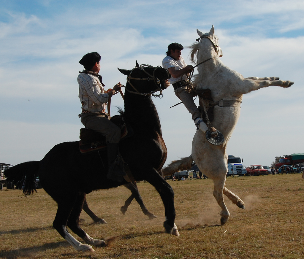 jinete jineteada doma